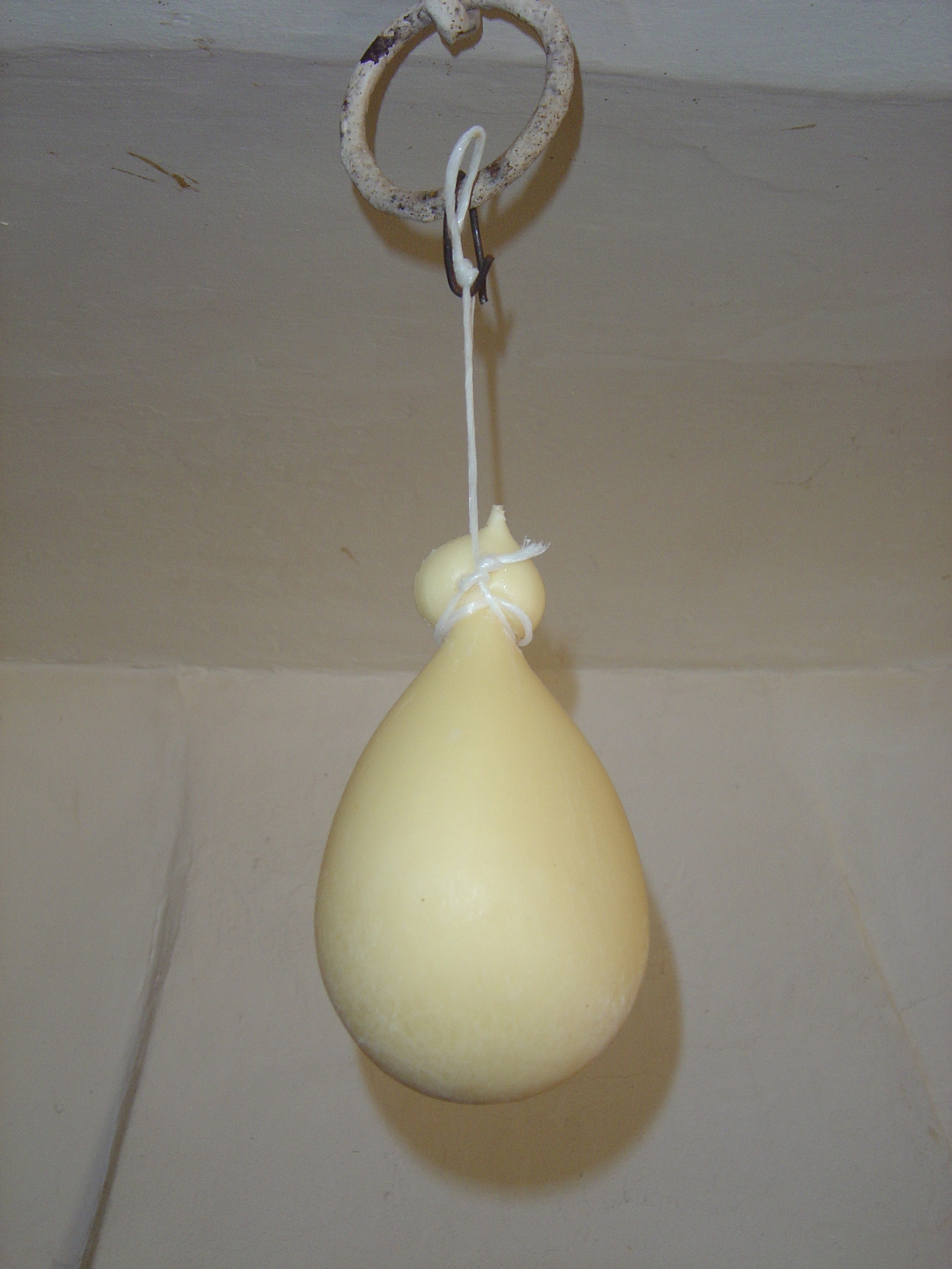 Caciocavallo